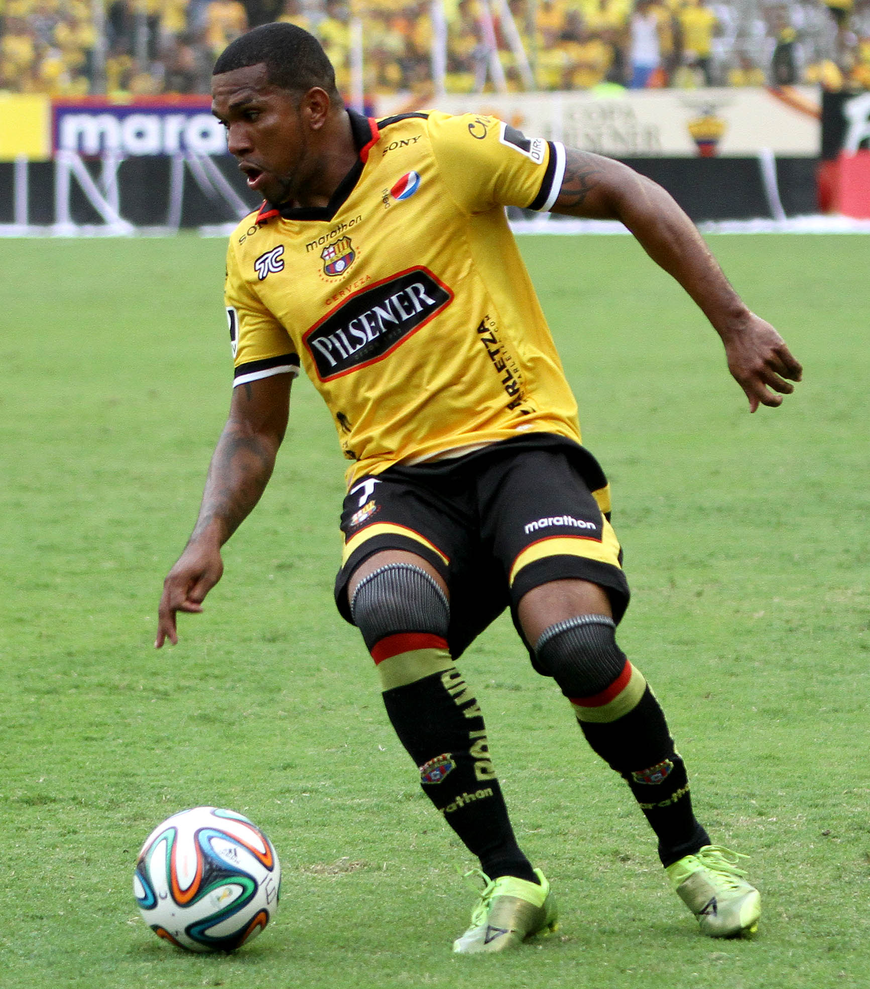 Guayaquil, 26 oct (Andes).- Encuentro entre Barcelona y El Nacional.